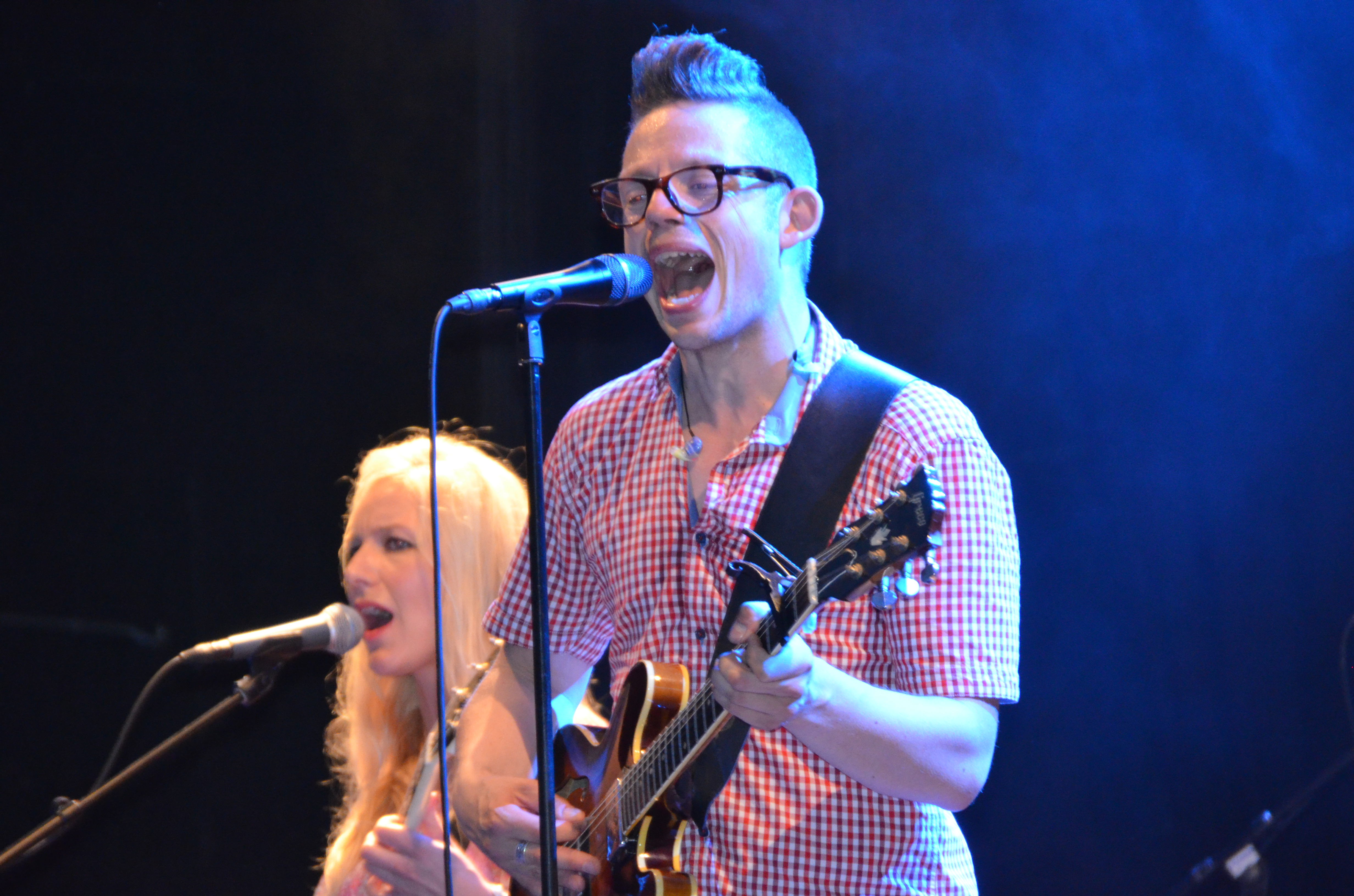 Jarle Bernhoft